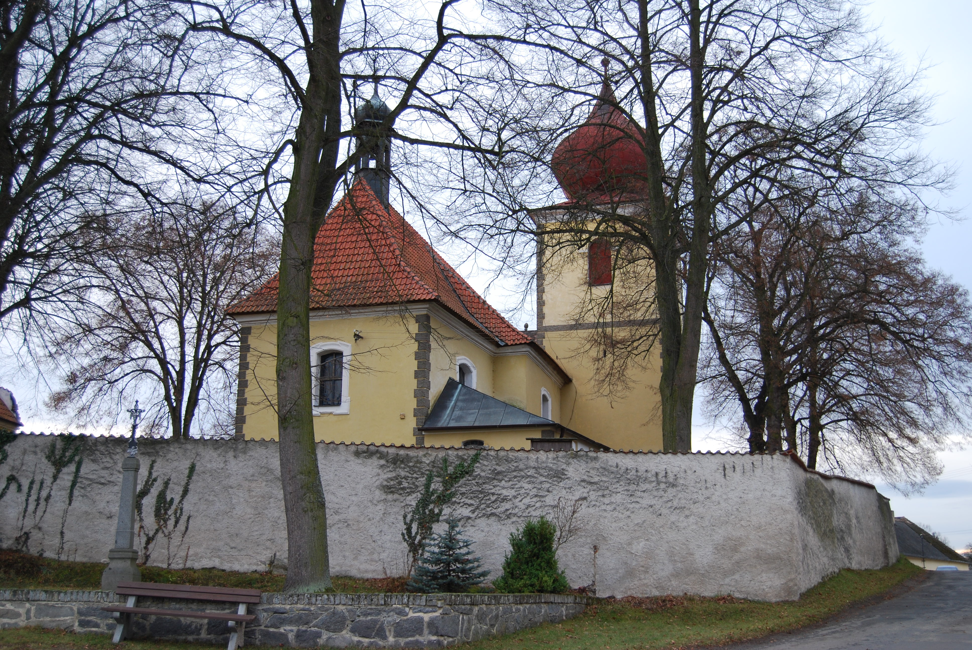 Kostel sv. Ondřeje ve vesnici. Radobytce. Část města Mirotice v okrese Písek. Česká republika.